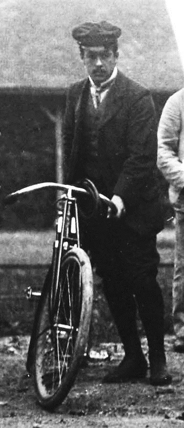 [Collection Jules Beau. Photographie sportive] : T. 23. Année 1903 / Jules Beau : F. 30v. Meeting de côte de Château-Thierry, 4 octobre [1903]